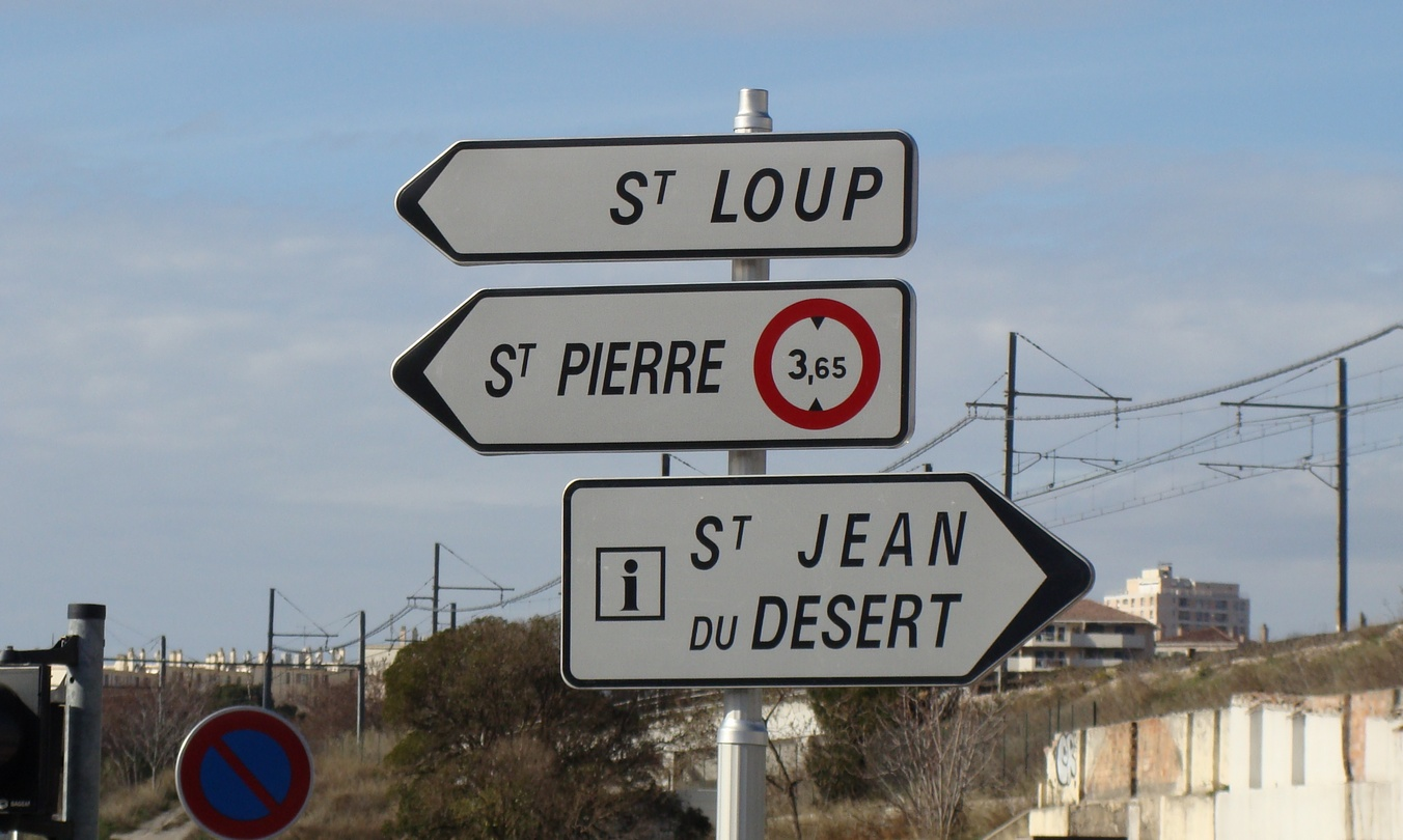 Panneaux indicateurs dans le 11e arrondissement de Marseille